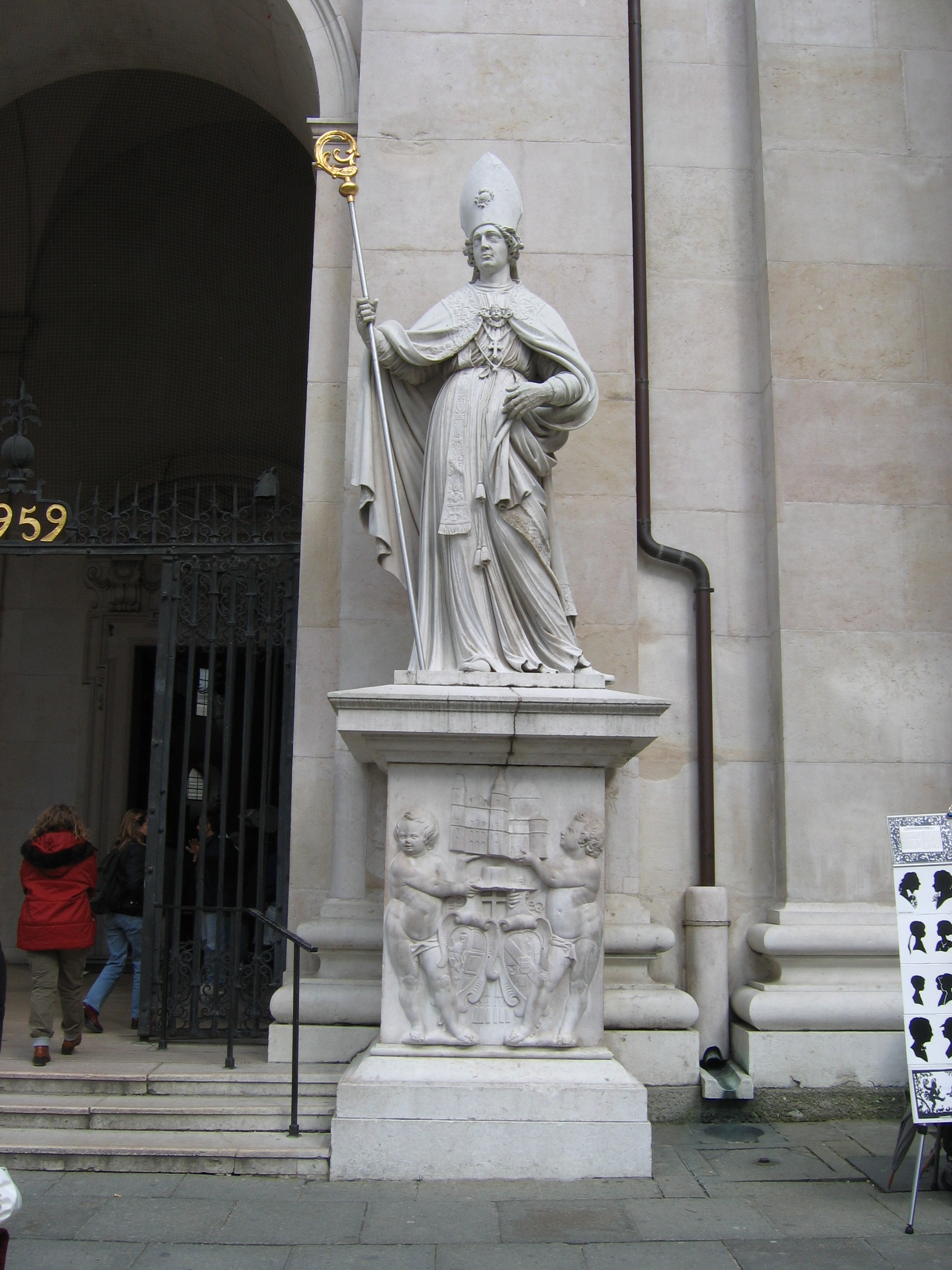 Statue von Virgilius von Salzburg am Salzburger Dom / Statue of Saint Virgilius at the Salzburg Cathedral